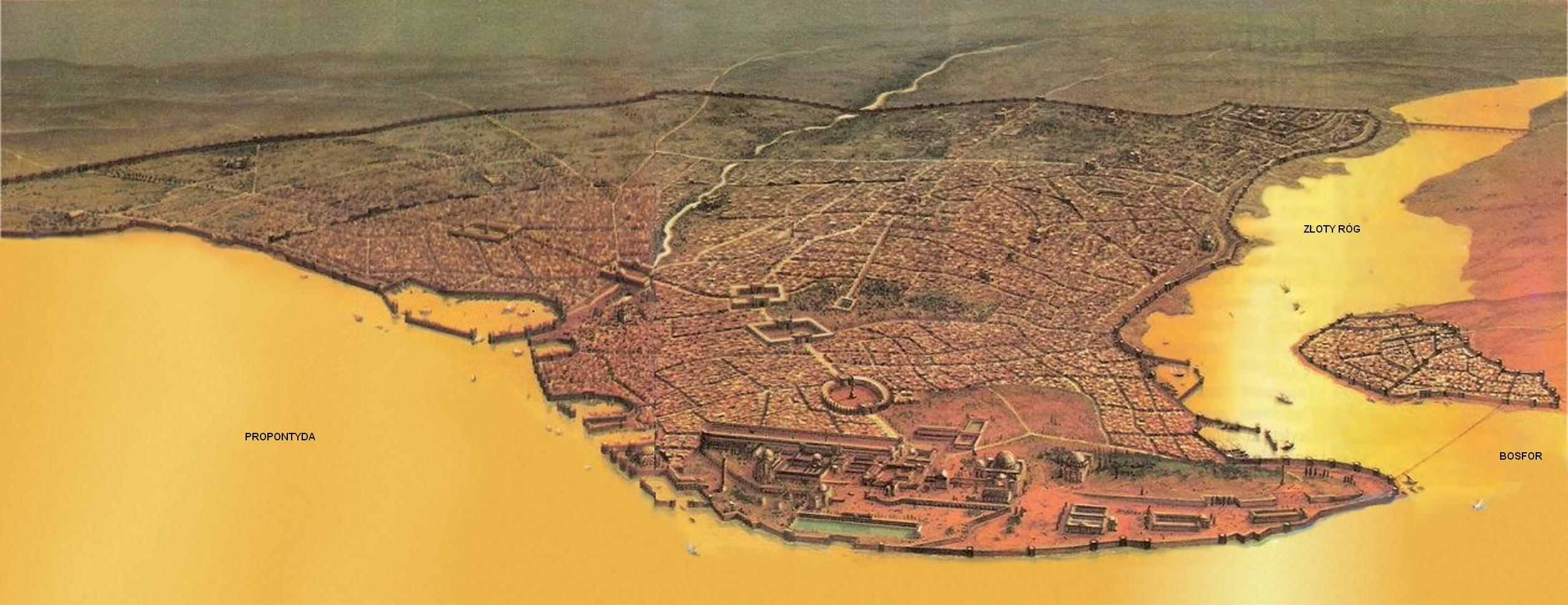 Constantinople in Byzantine times